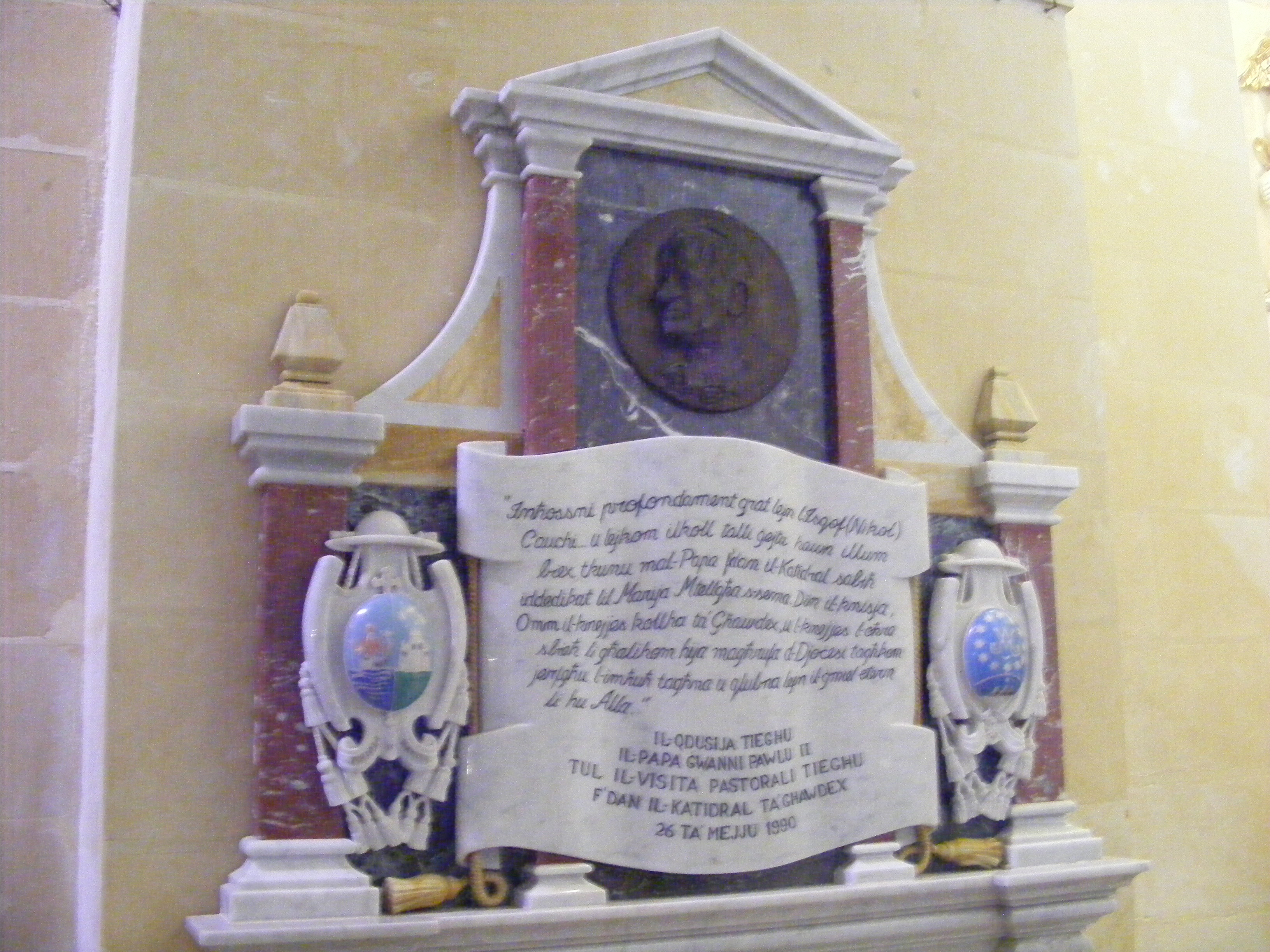 Płaskorzeźba upamiętniająca wizytę papieża św. Jana Pawła II w katedrze 26 maja 1990. Na tablicy fragment mowy wygłoszonej wtedy do wiernych w języku maltańskim.